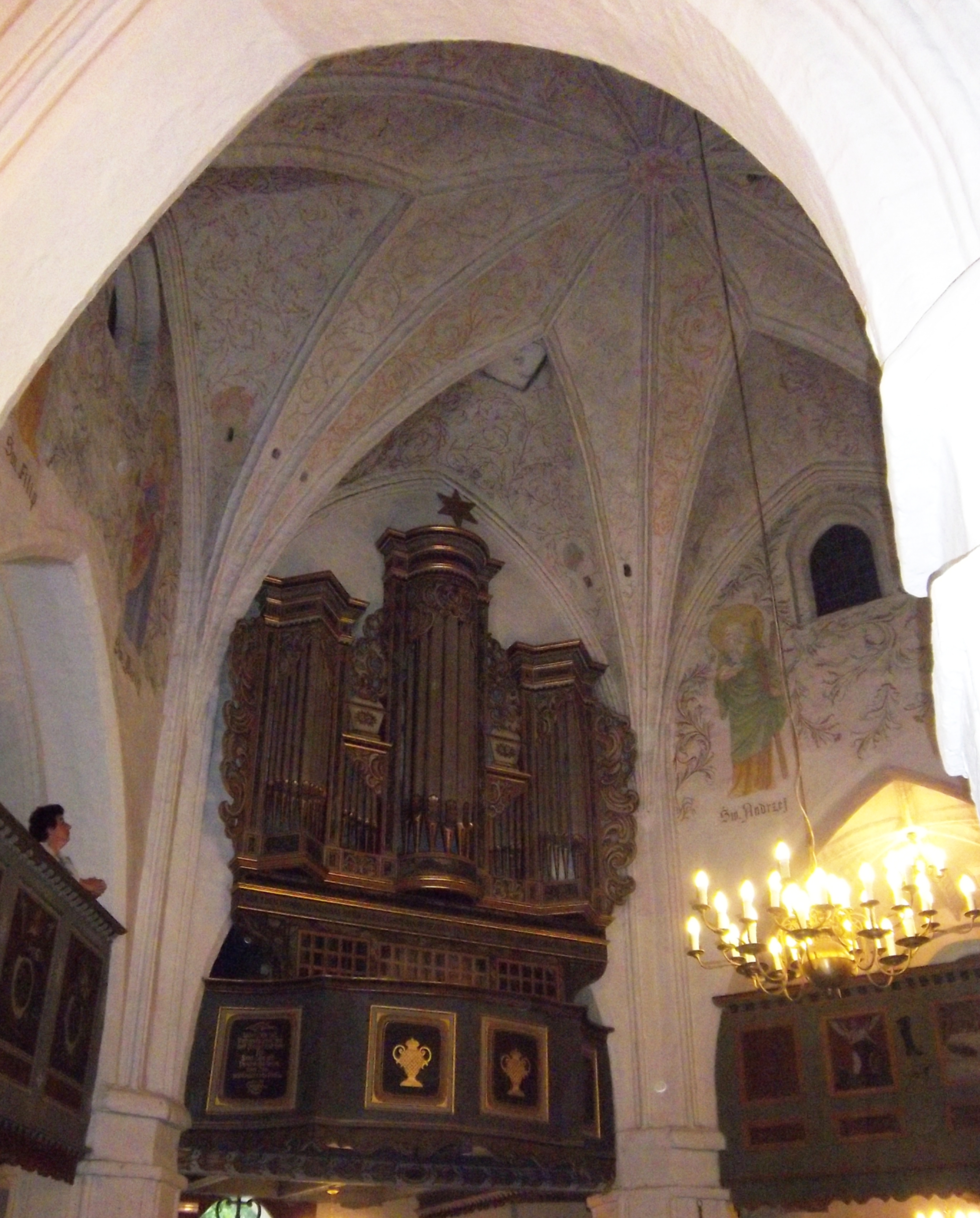 Kościół św. Gertrudy w Darłowie